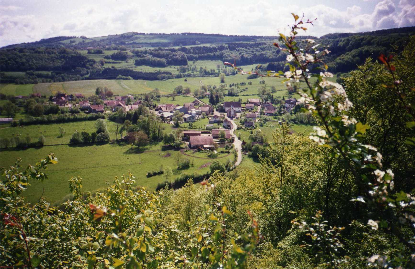 Vue générale de rosières